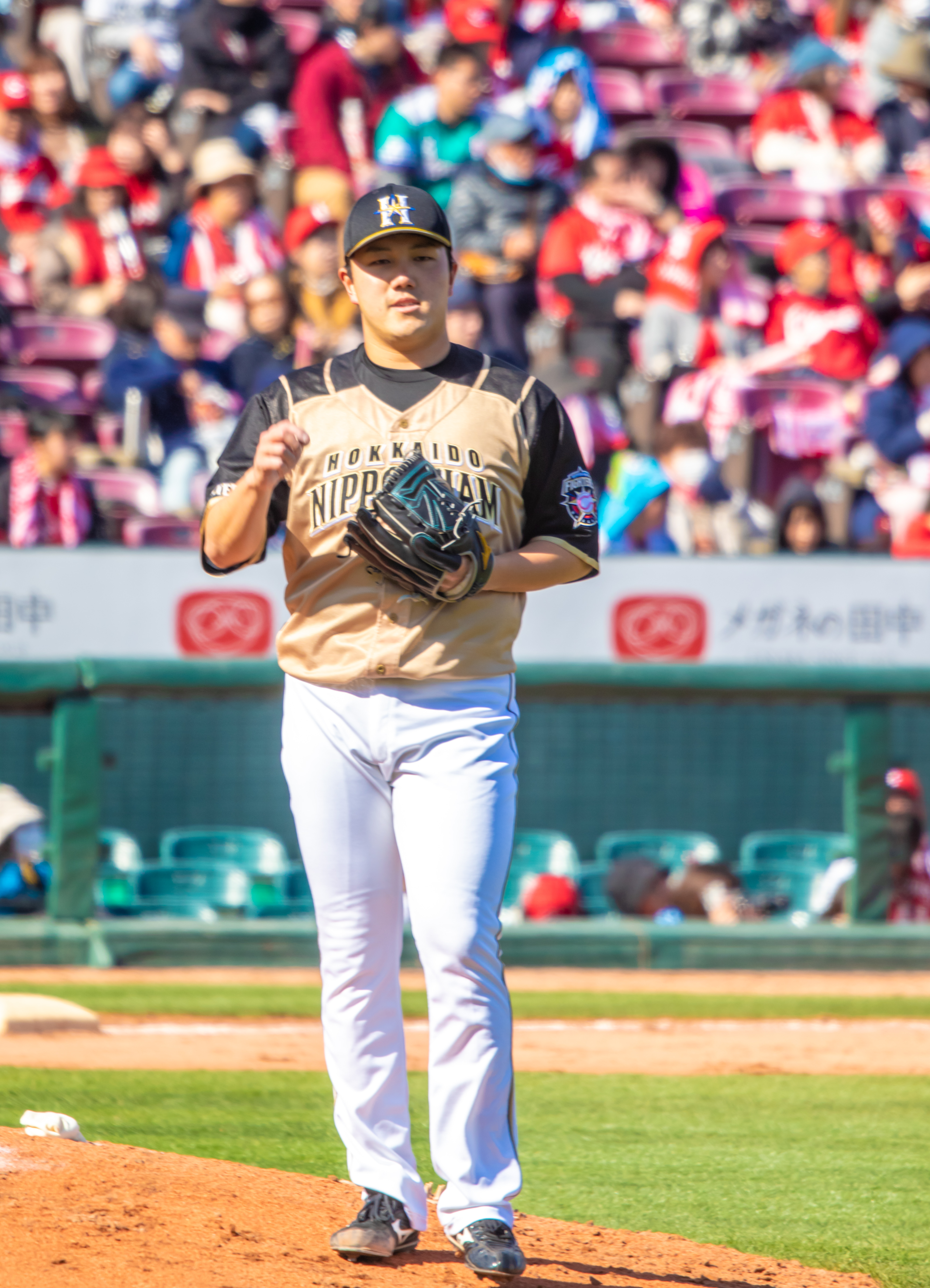 2018/3/13 マツダスタジアム